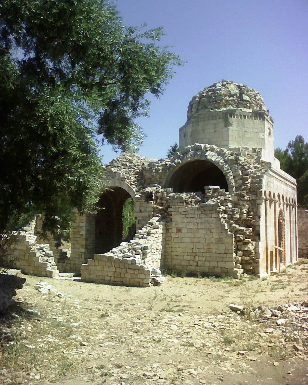 chiesa di san felice in balsignano - Modugno (bari)-Italy